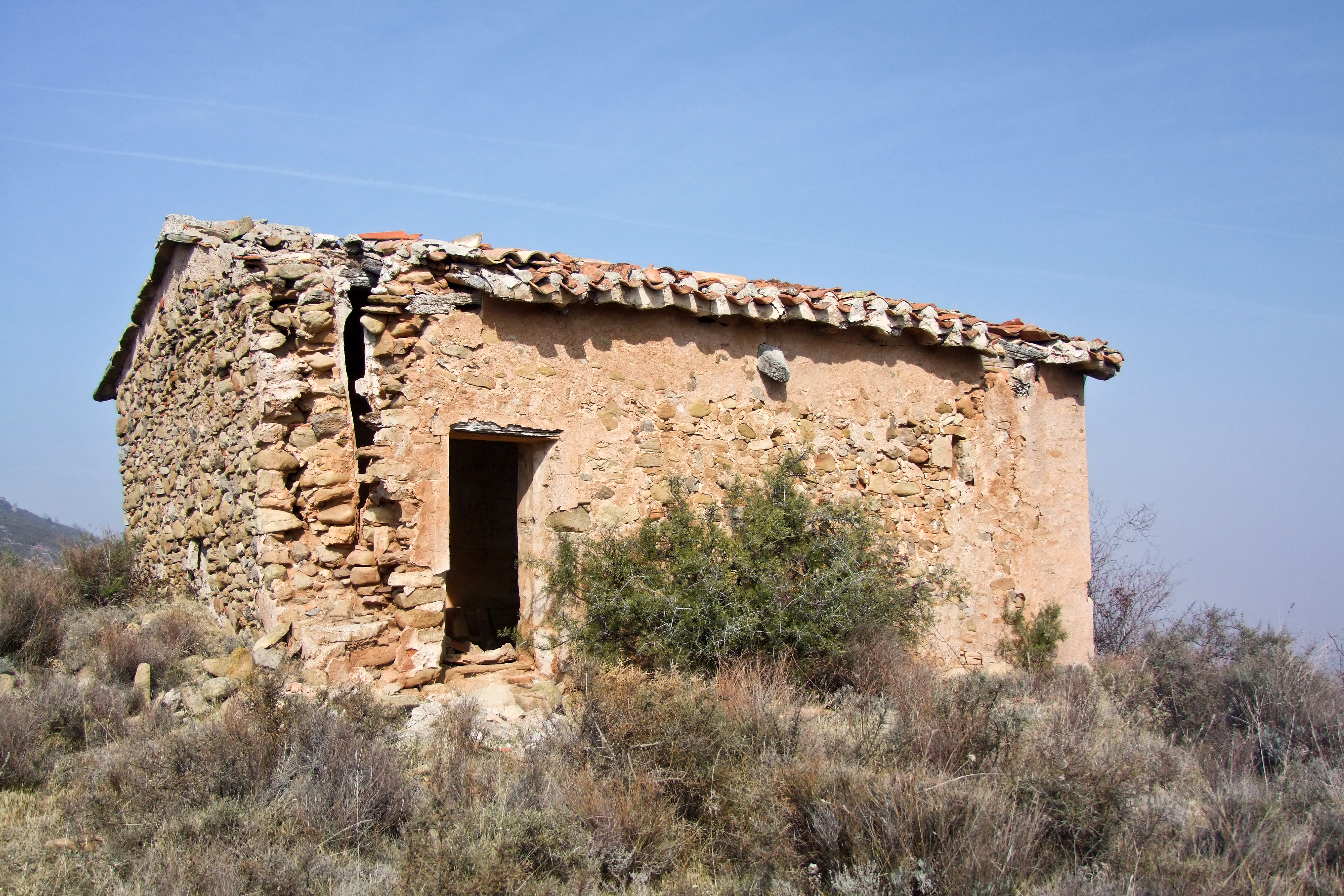 Ermita de San Cristóbal en la localidad de Santa Engracia del Jubera, La Rioja - España